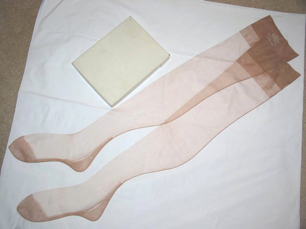 Sheer stockings